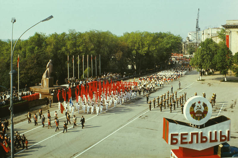 Balti (1985).